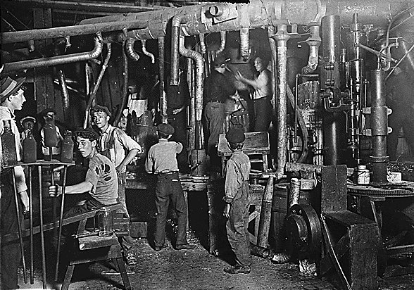 Une vieille photo montrant une usine de verre au XIXe dans l'Indiana, où travaillent entre autres des enfants